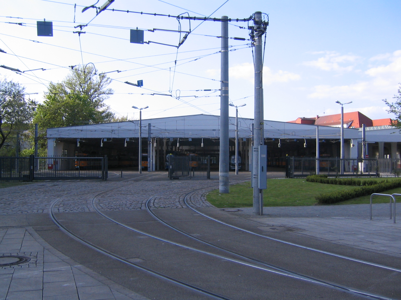 Straßenbahnhof Angerbrücke in Leipzig